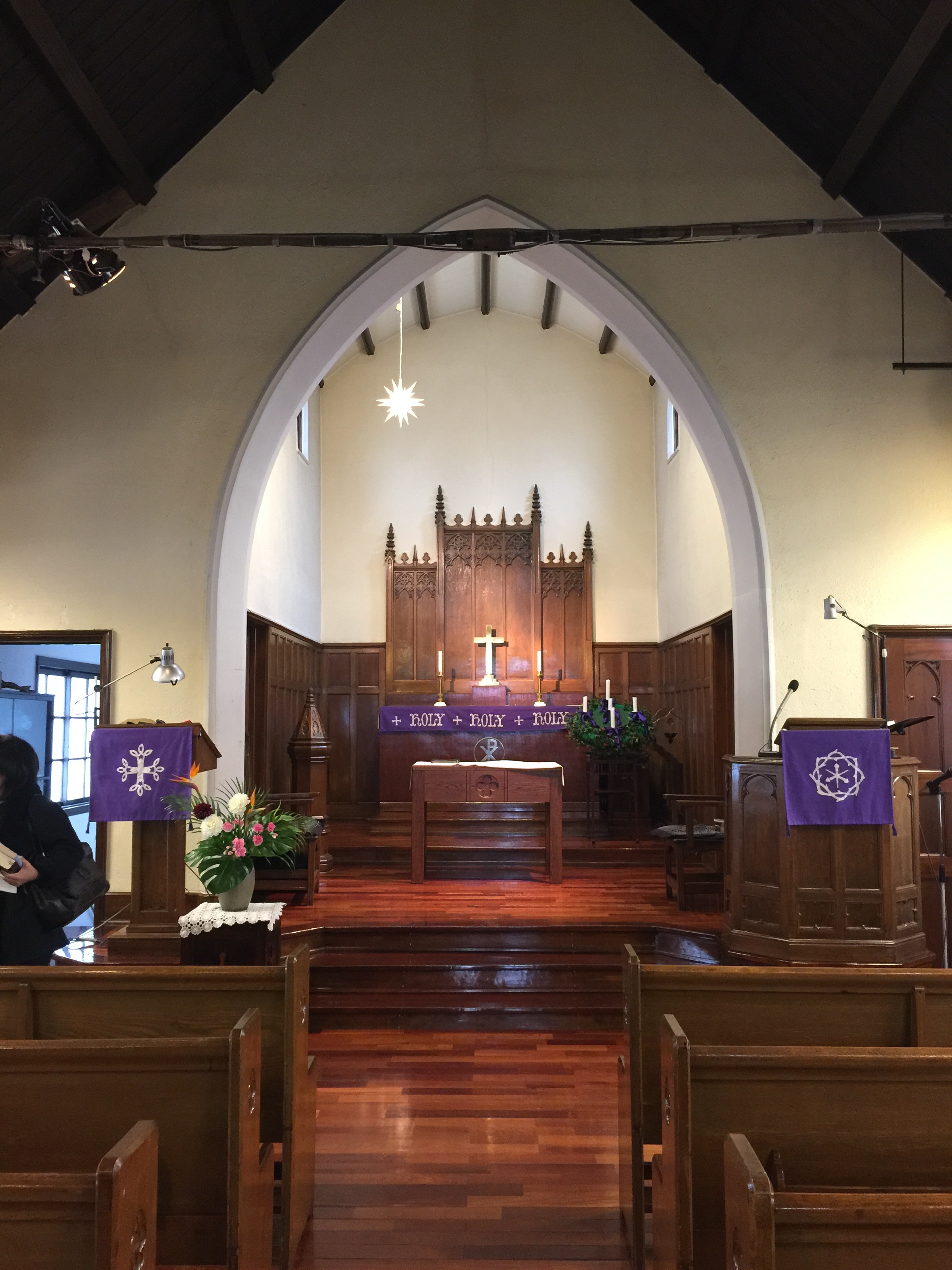 礼拝堂の中